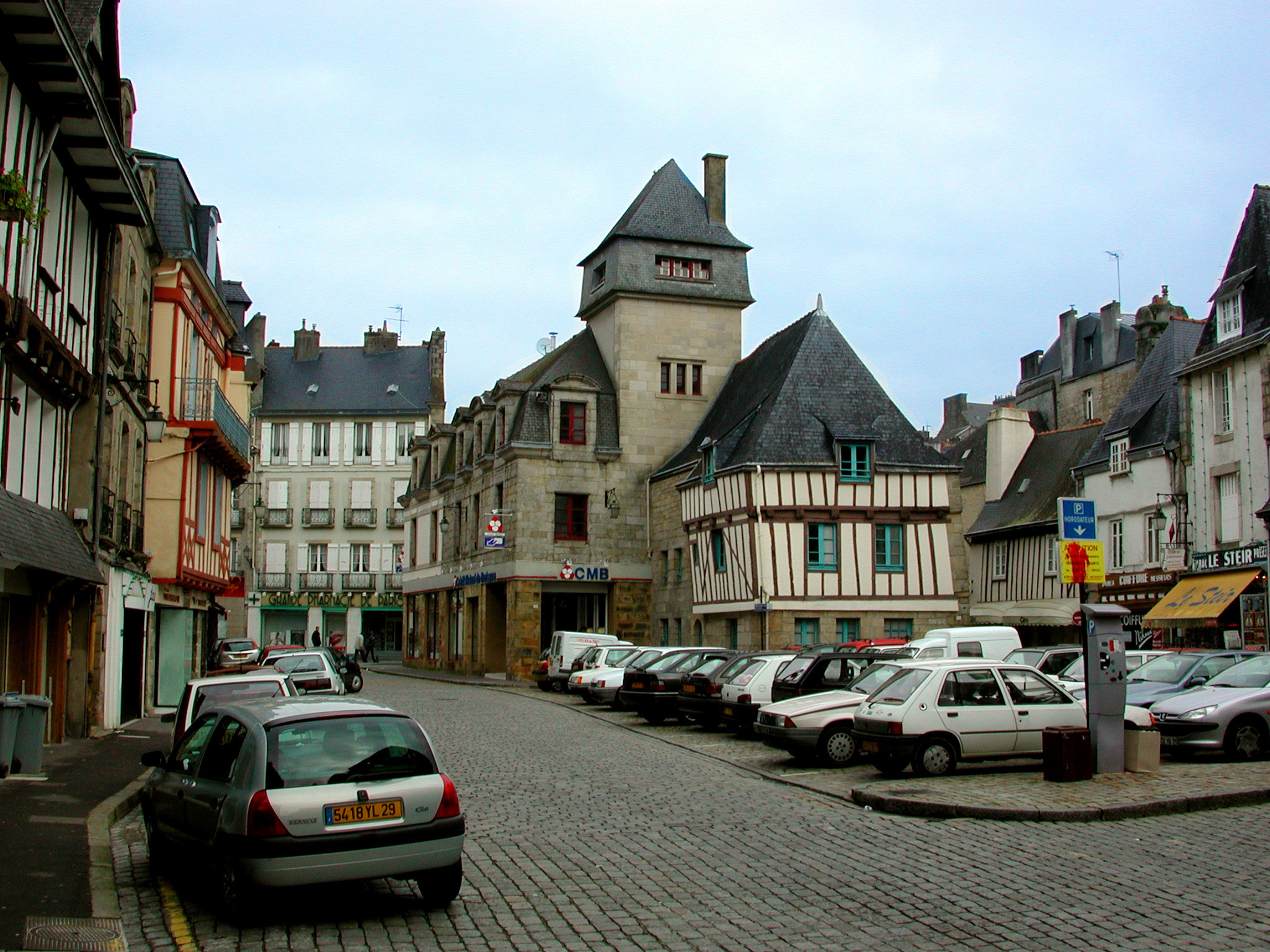 Sean-tithe leath-adhmad i lar Kemper.